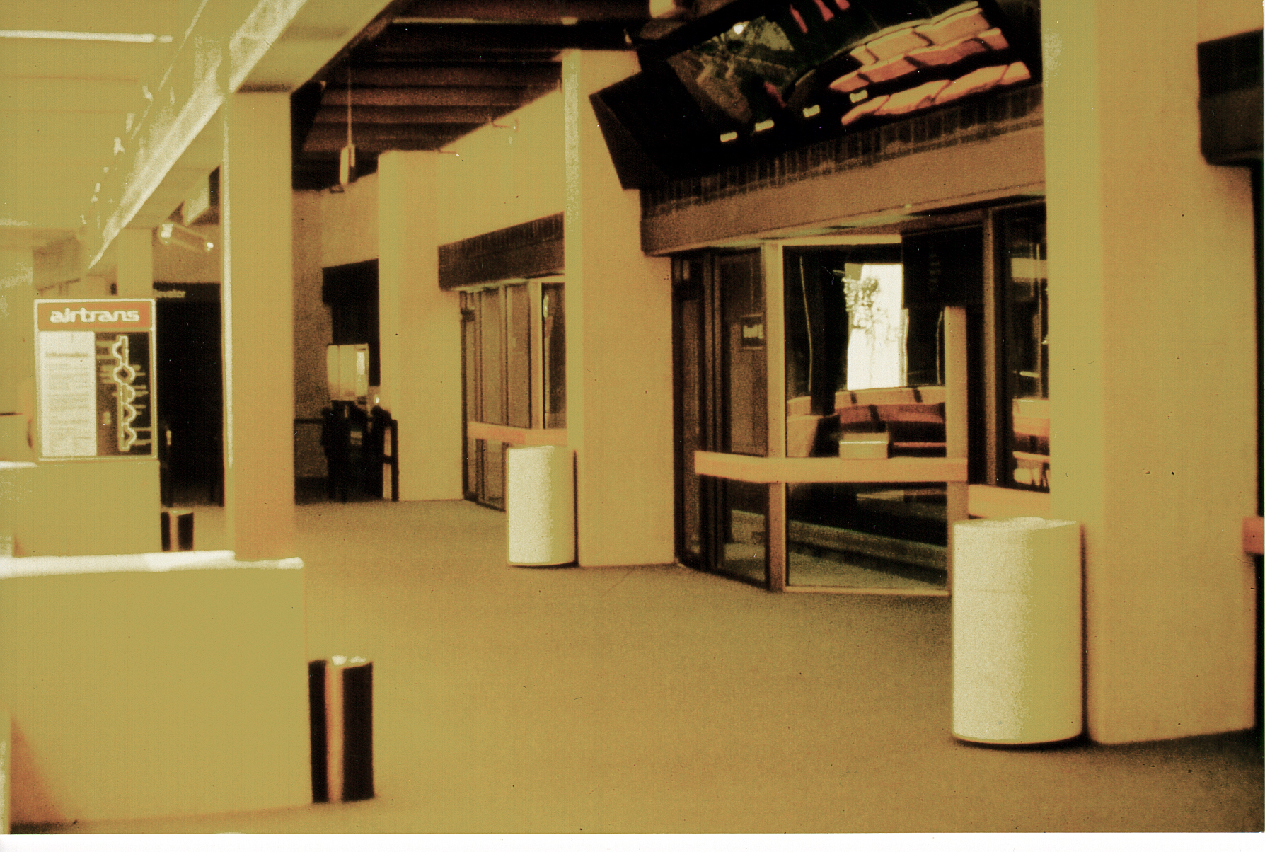 Airtrans Passenger Station